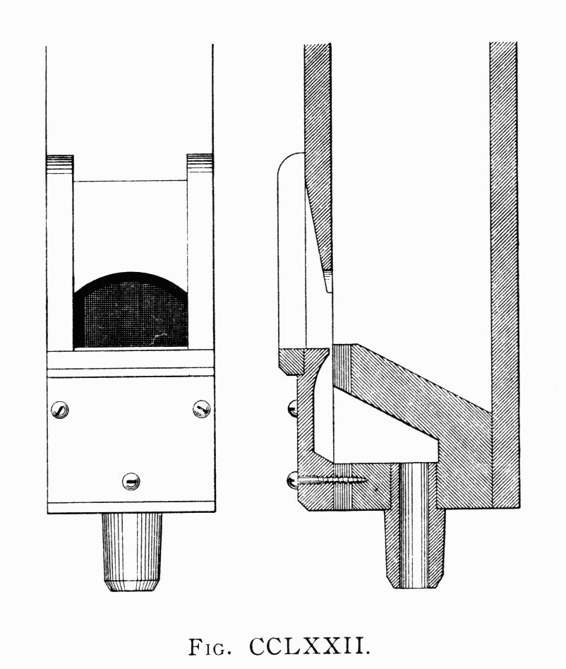 Bourdon - orgonaregiszter